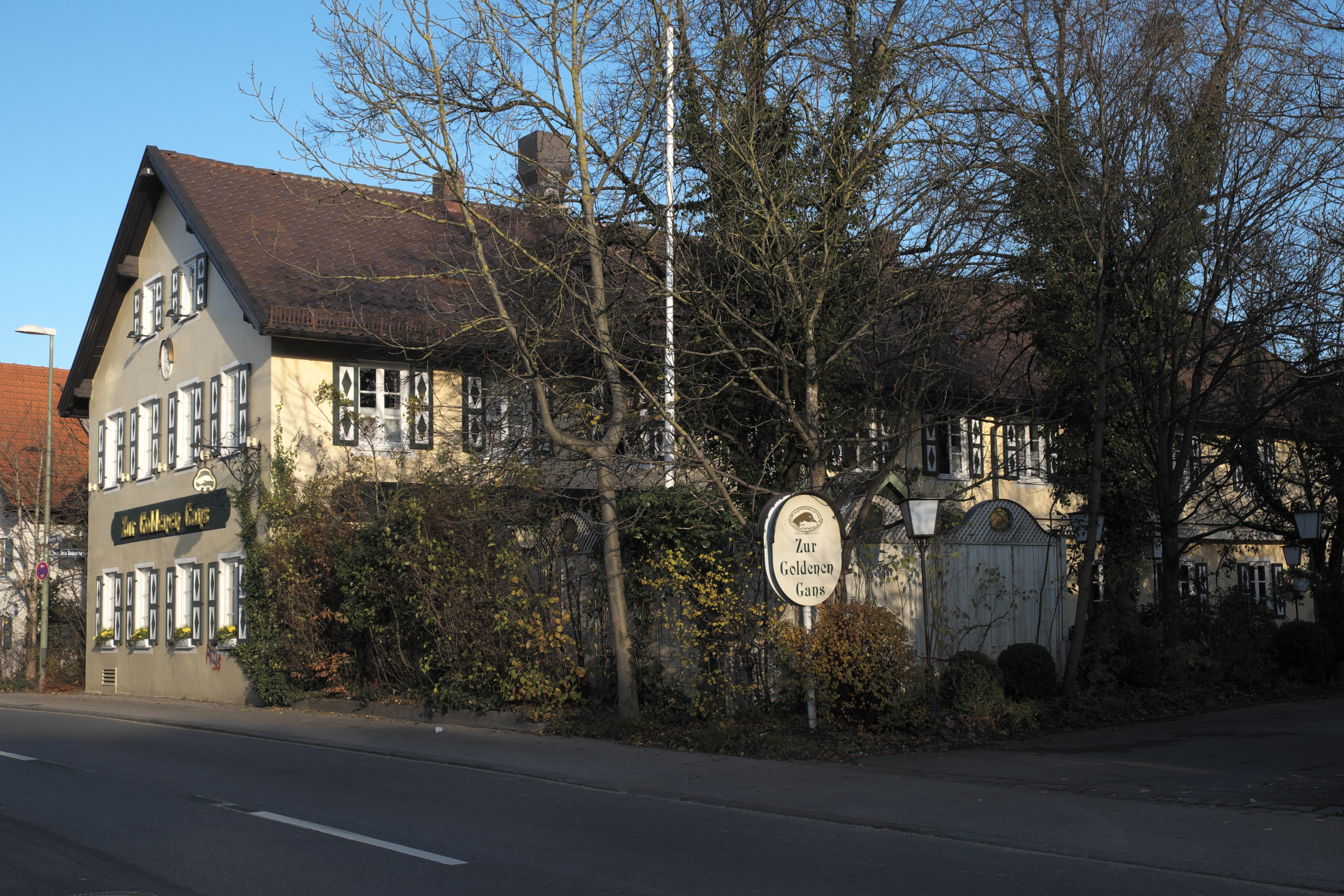 Gasthof in der Planegger Straße 31 im Münchner Stadtteil Pasing (Bayern, Deutschland)